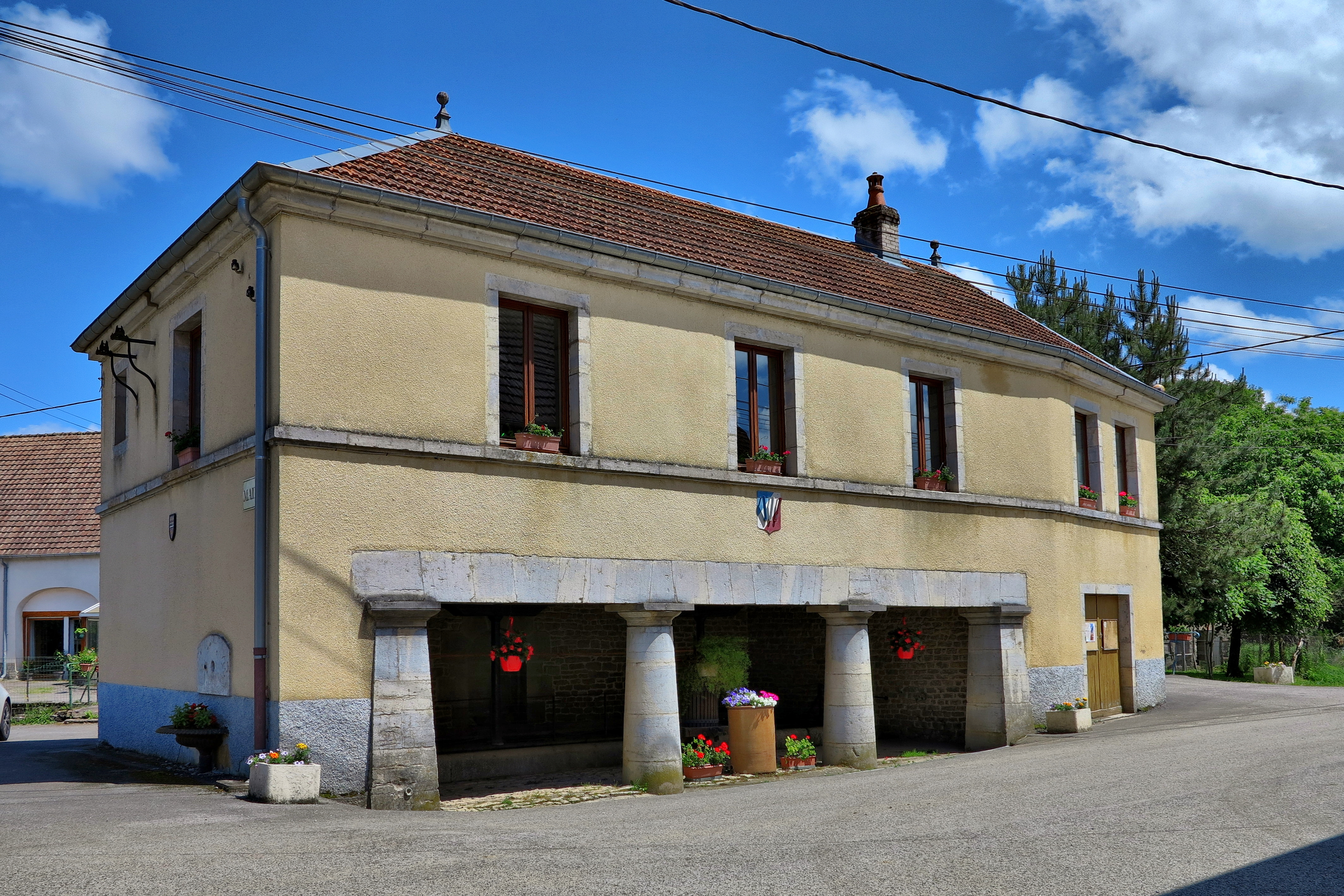 La mairie-lavoir